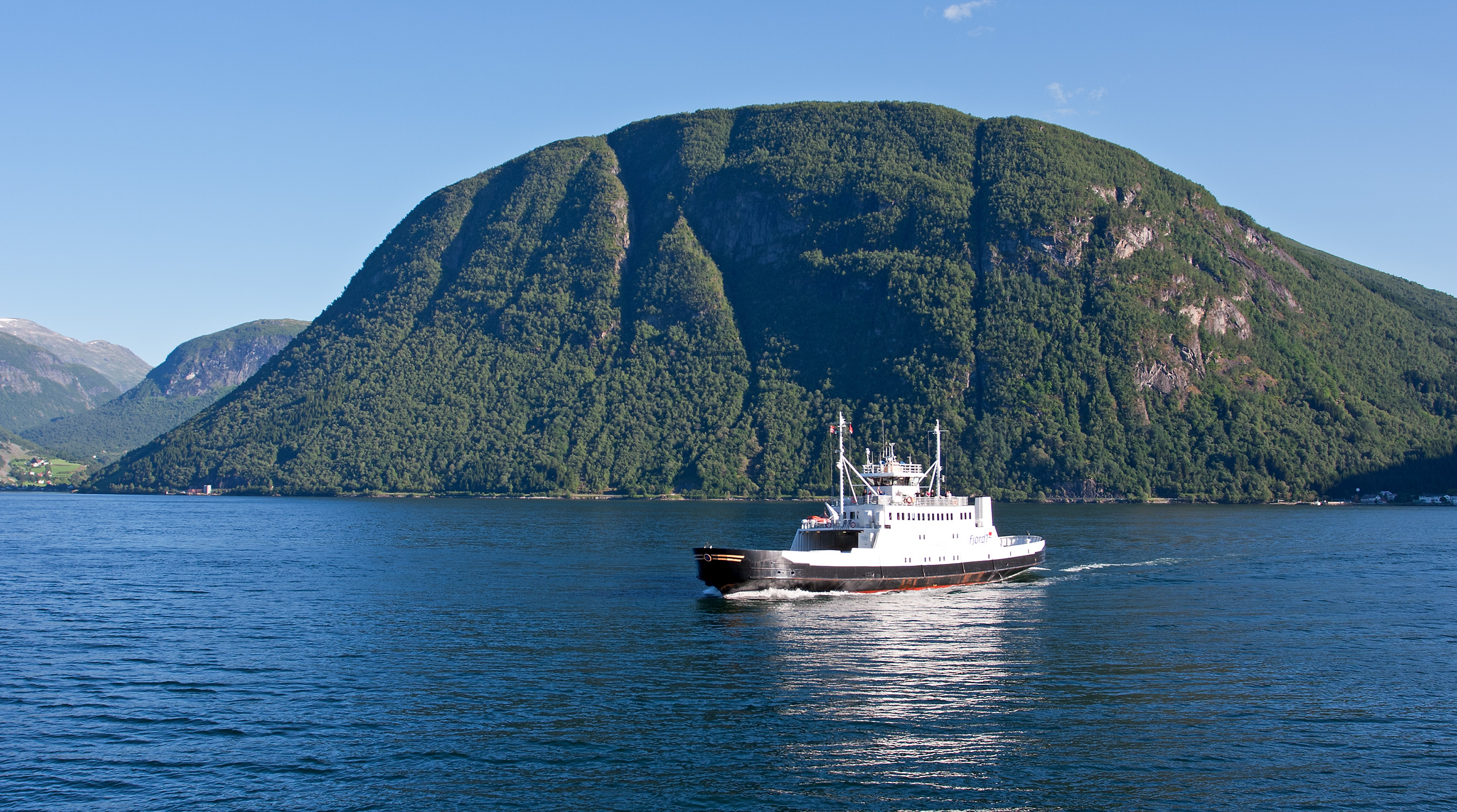 Linge - Eidsdal ferry line on Storfjord / Norway